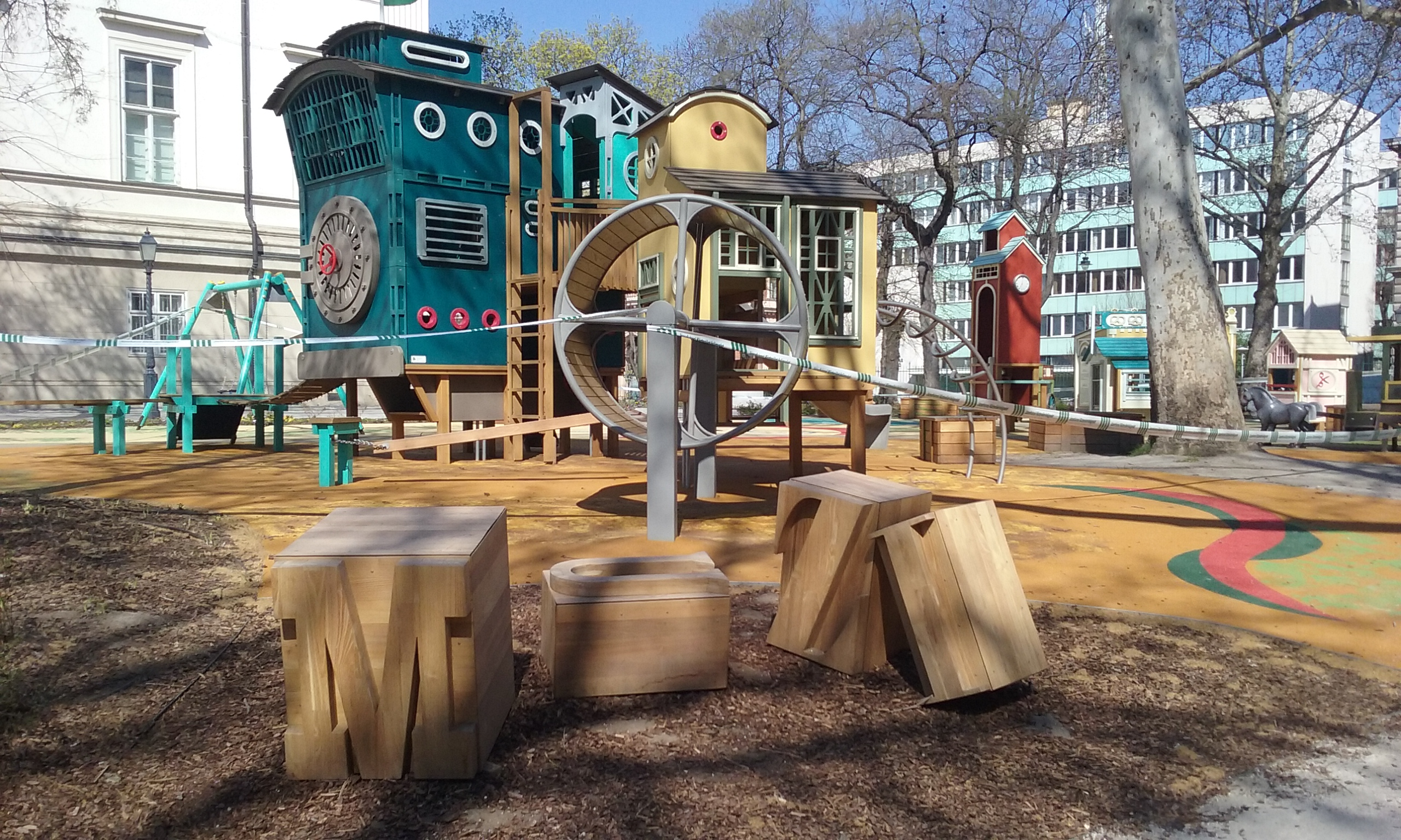 A Múzeumkert koronavírus-járvány miatt lezárt játszótere, Budapest